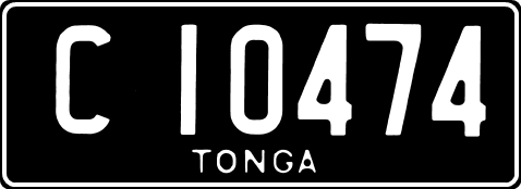 малюнок номерного знаку